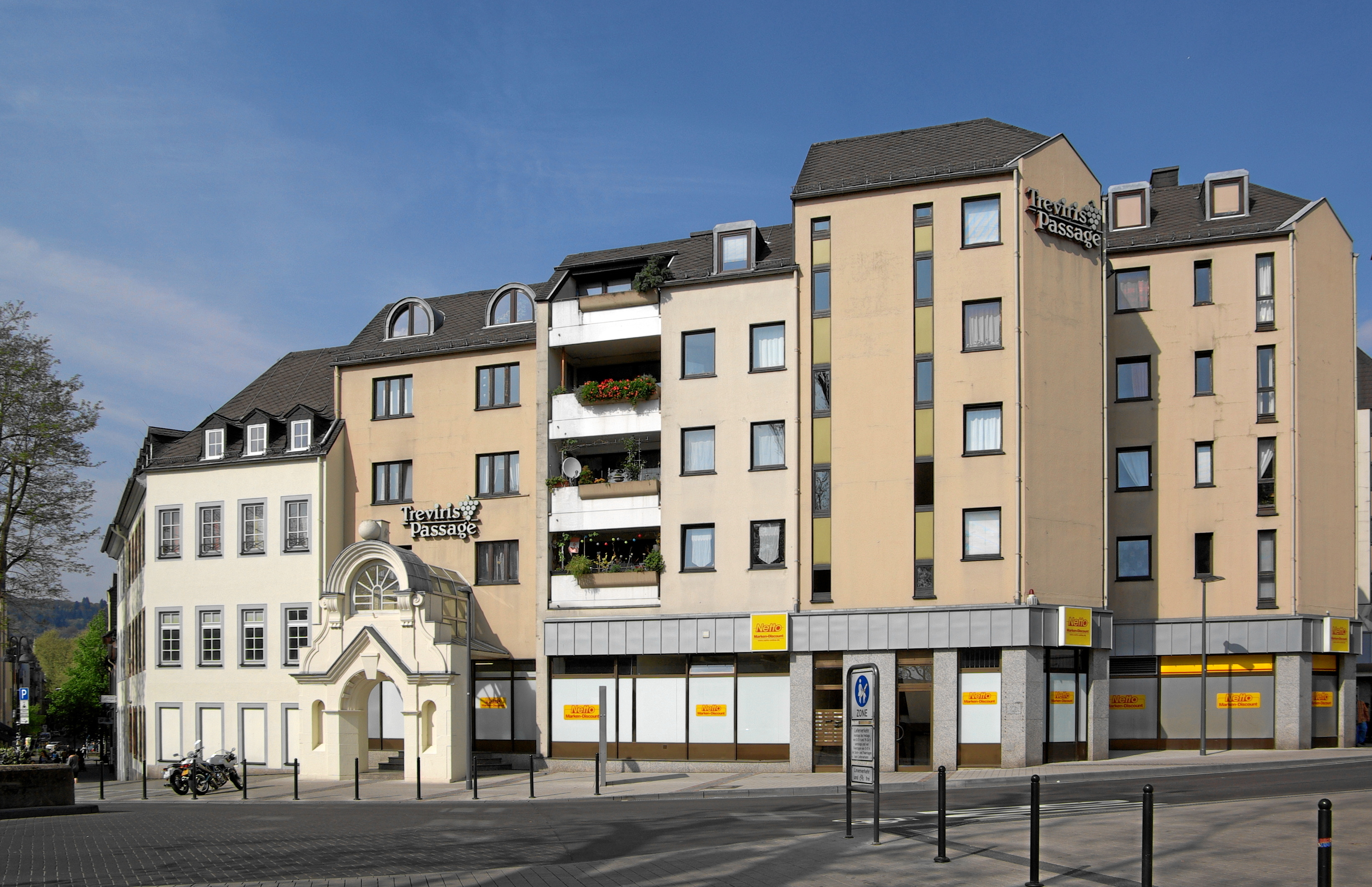 Trier, Jakobstraße, Treviris Passage